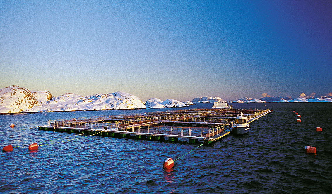 Fish farming in Nord-Trøndelag